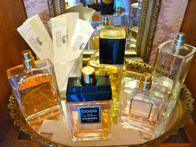 Fragrance samples